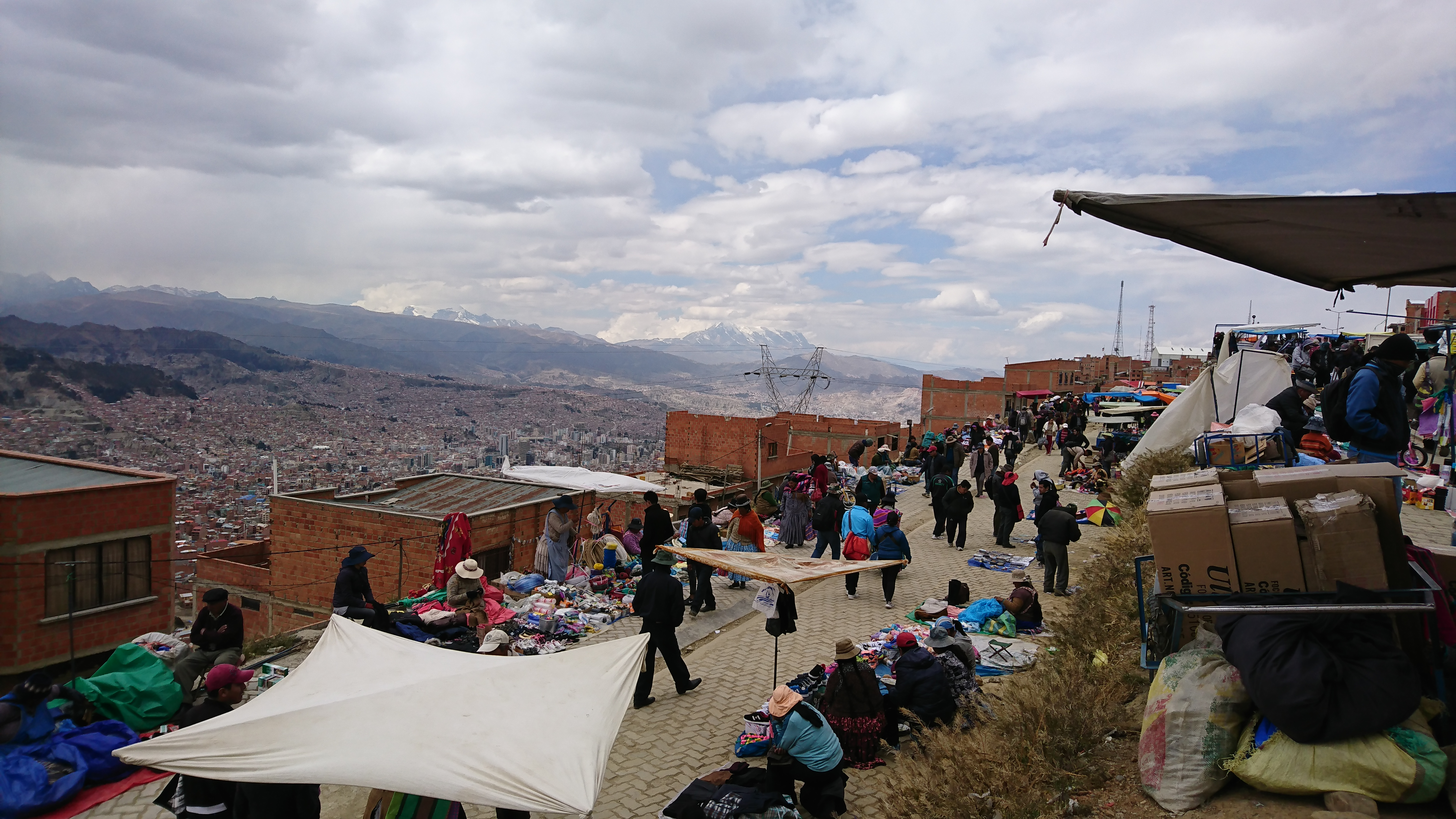 Vista de la ciudad de La Paz, desde el área limítrofe de los municiopios de El Alto y La Paz, en día de Feria